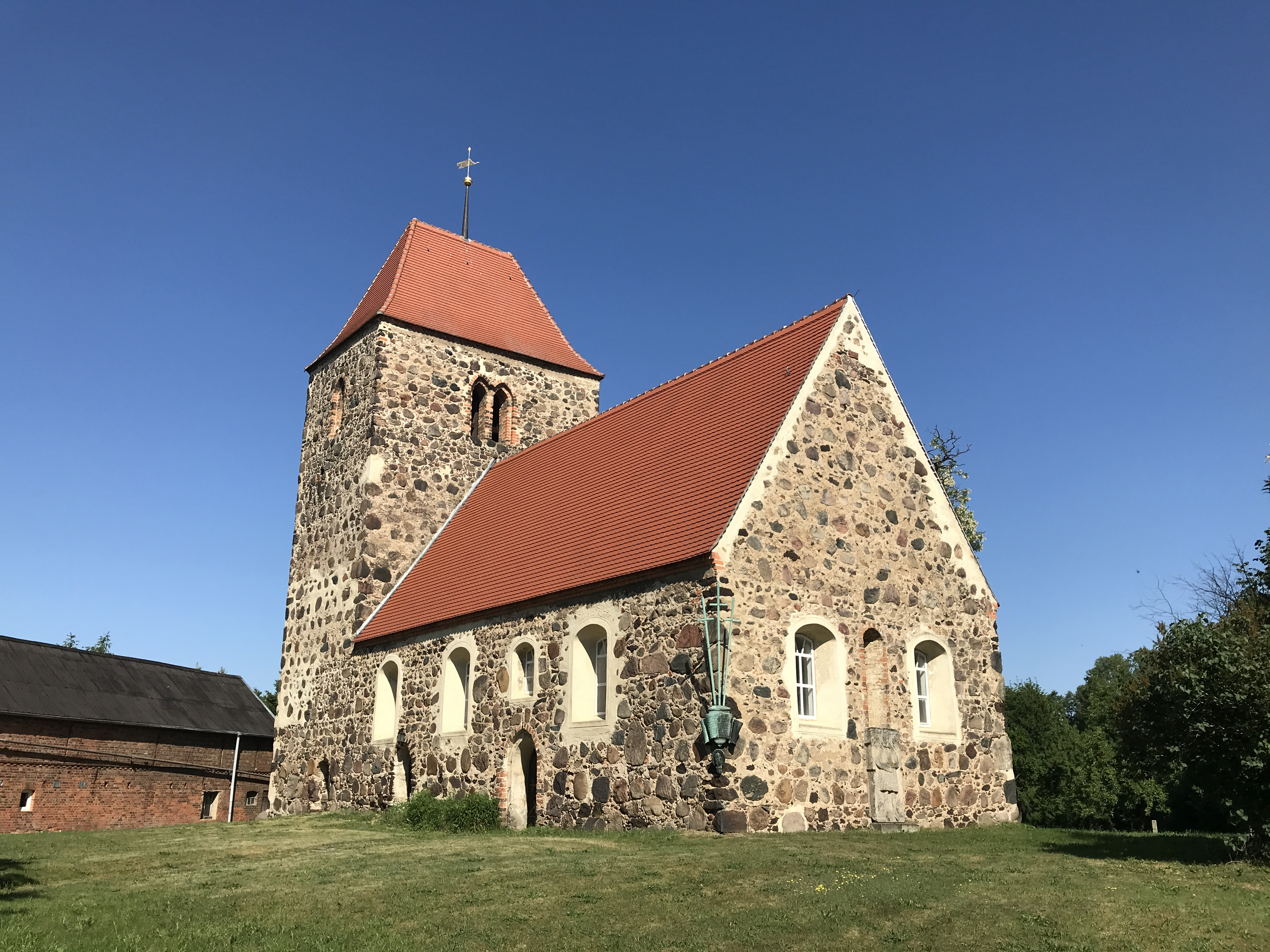 Die Dorfkirche Drahnsdorf im Landkreis Dahme-Spreewald entstand in der ersten Hälfte des 15. Jahrhunderts. Im Innern steht unter anderem eine hölzerne Kanzel aus dem Anfang des 18. Jahrhunderts.